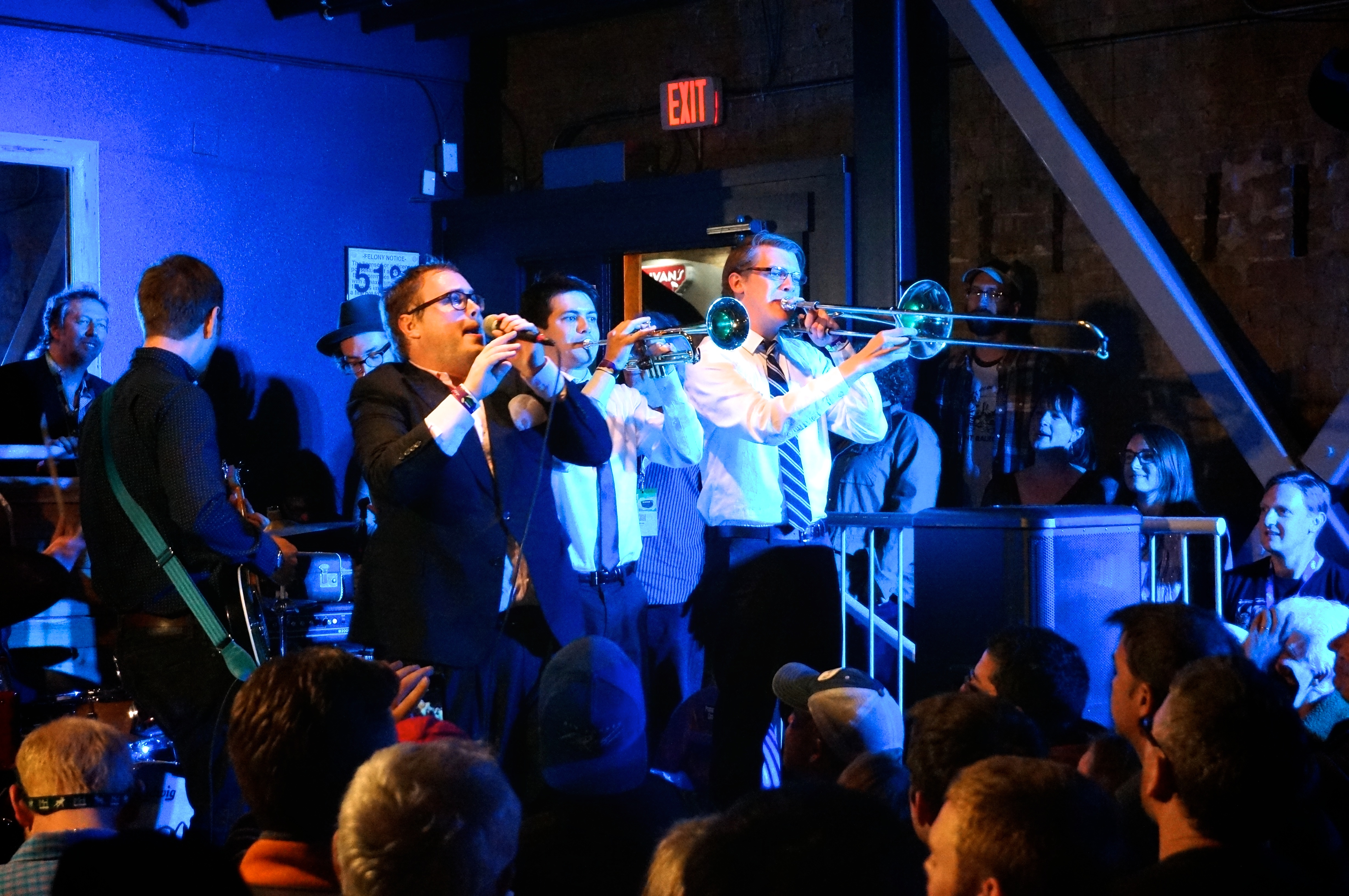 St. Paul and The Broken Bones live